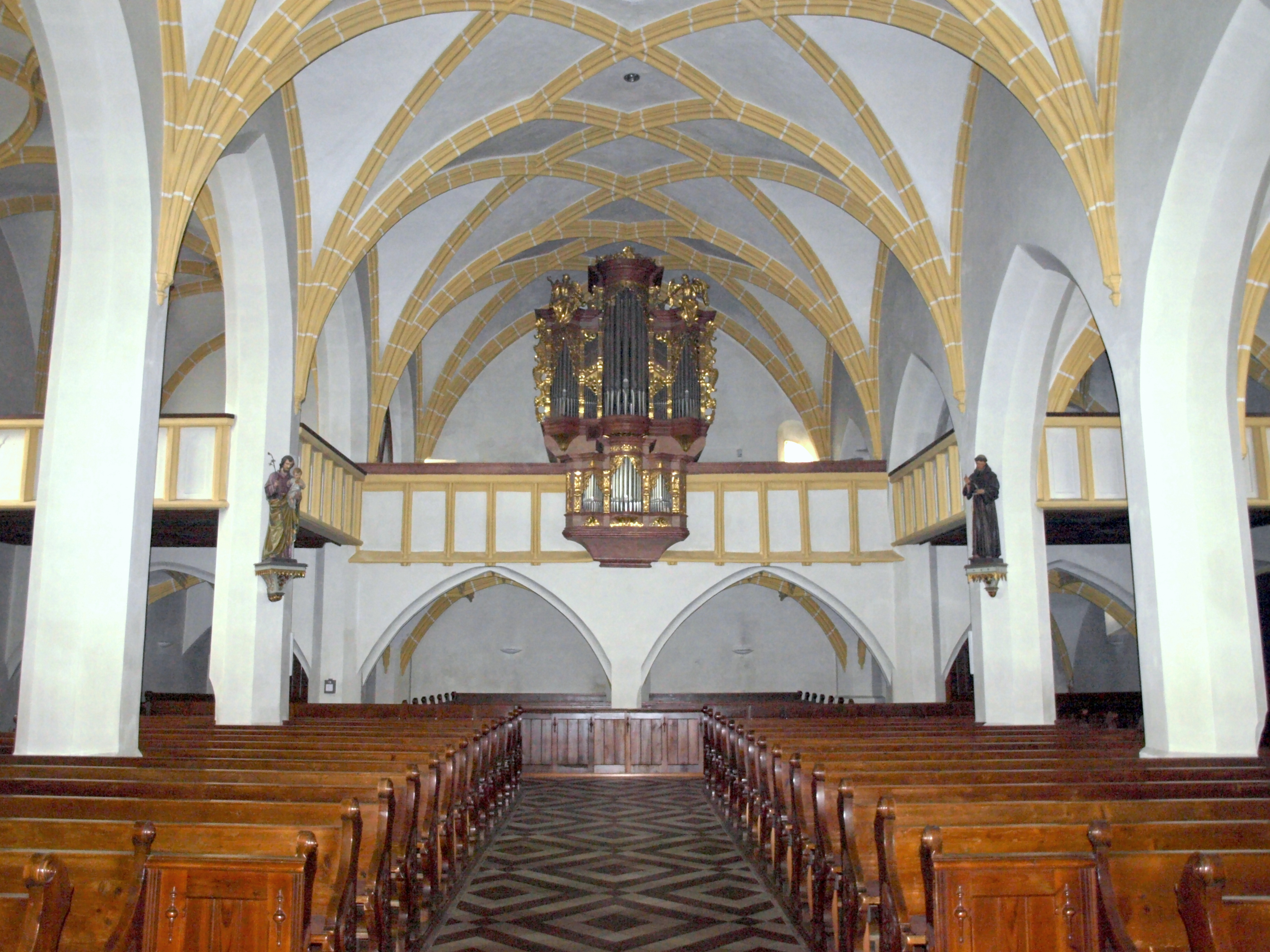 Kath. Pfarrkirche hl. Martin